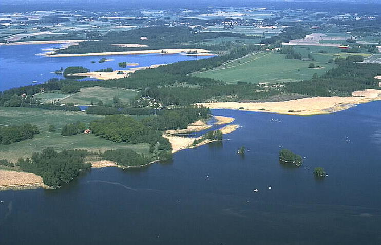 Vid Norra Ässundet. Motiv: Skävesund Nyckelord: Flygbilder, Riksintressen Kategori: Insjömiljöer Vid Norra Ässundet.